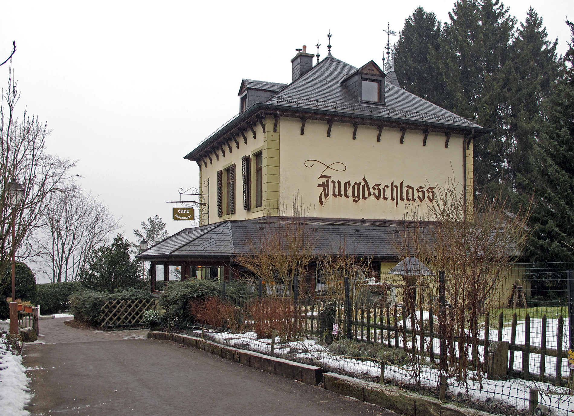 Restaurant Juegdschlass